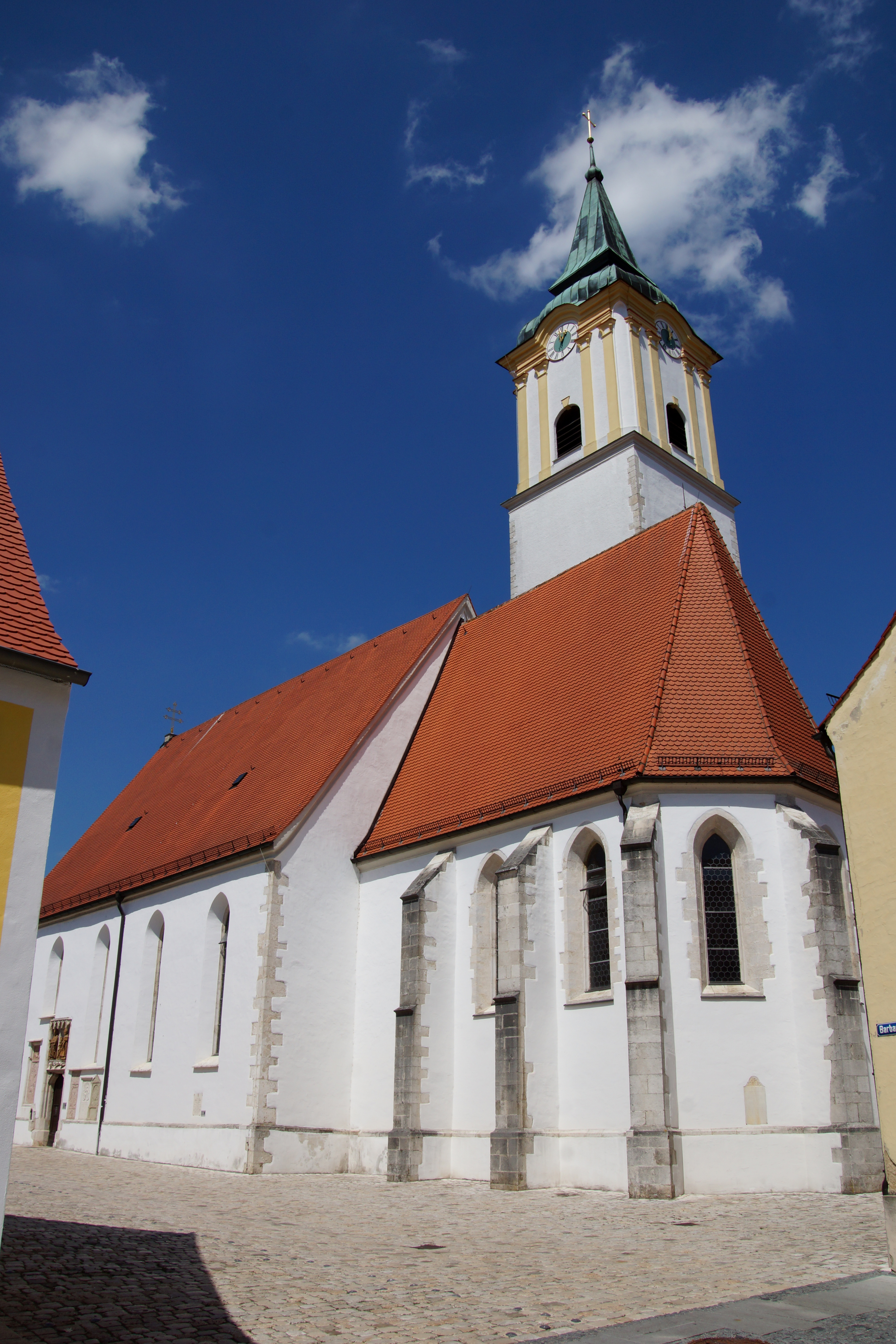 Die Pfarrkirche St. Barbara in Abendsberg